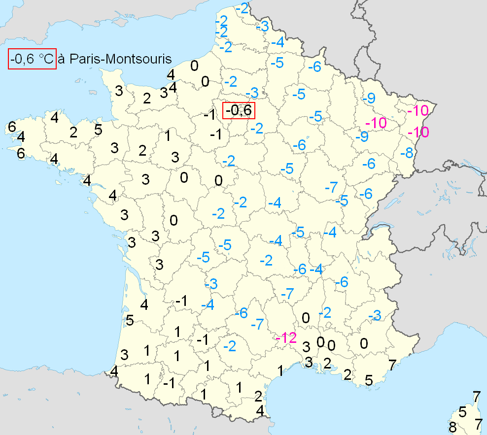 Température maxi du 19 décembre 2009 en France.